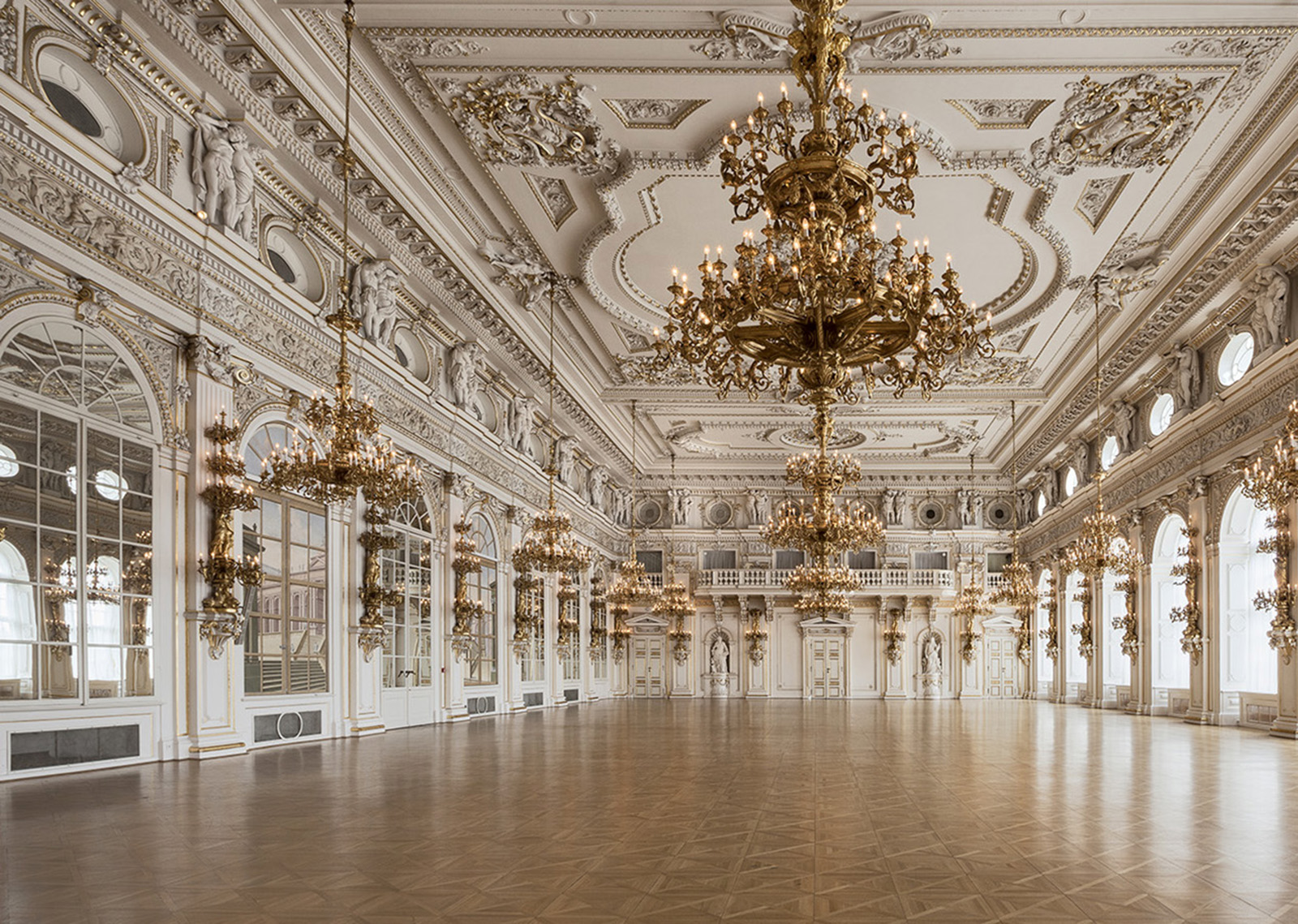 Španělský sál Pražského hradu, foto Ivan Pinkava (2019)